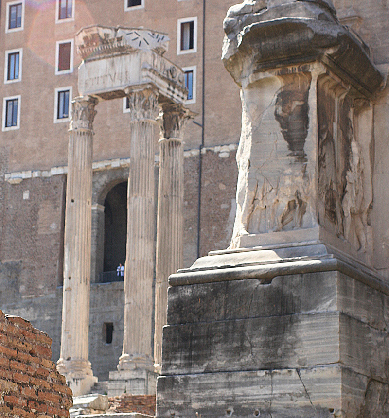 Templo de Vespasiano en el Foro Romano